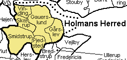 Holmans Herred, Vejle Amt, Denmark Map by Svend-Erik Christiansen, DIS-Danmark, edited by Nico-dk.